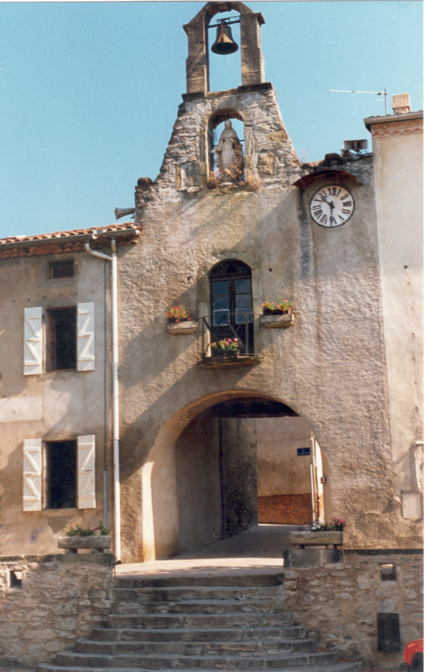 camon